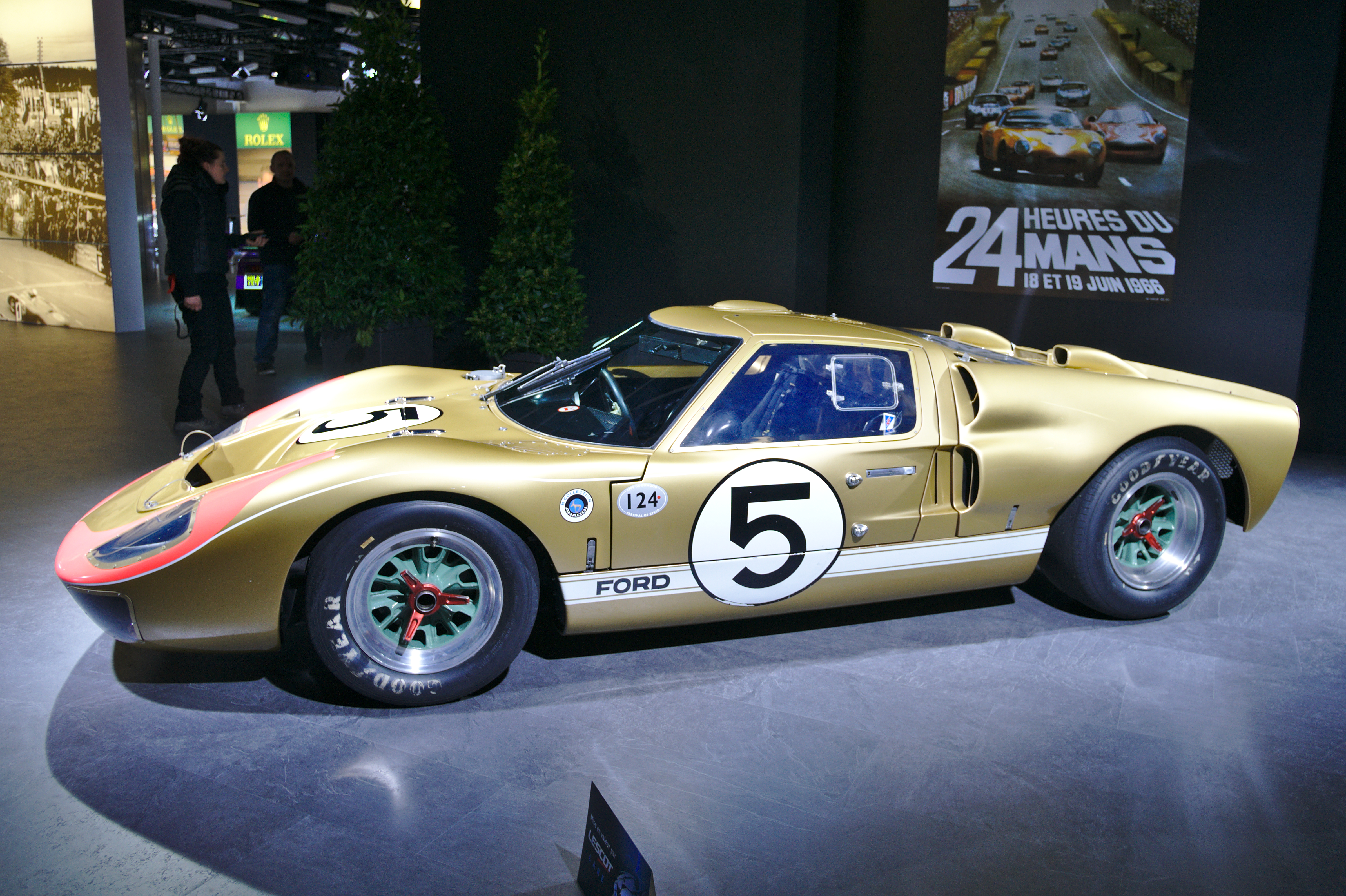 Salon de l'auto de Genève 2014 - 20140305 - Expo Le Mans